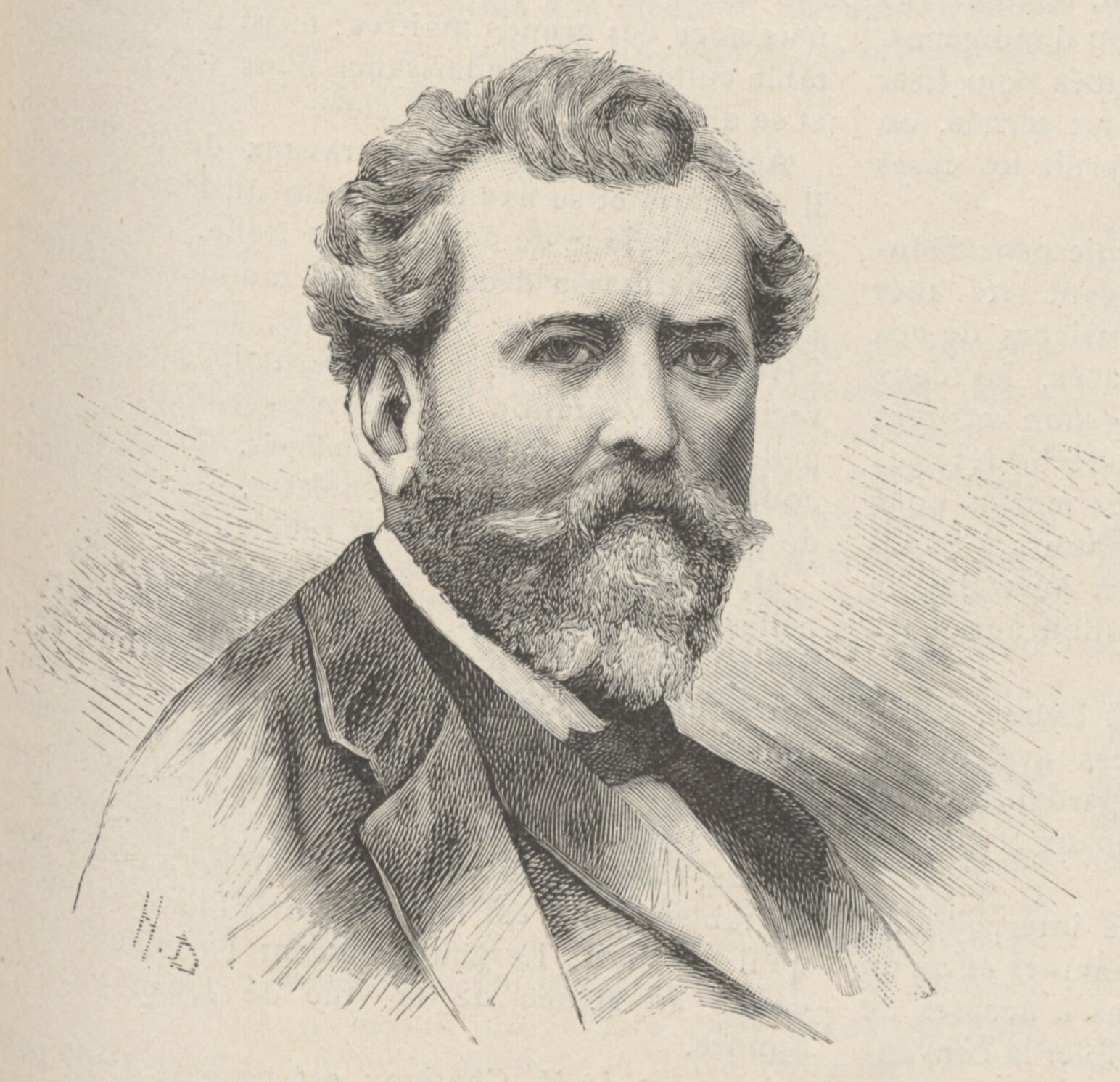 Portrait signé H.D. publié dans la revue Le Voleur illustré : cabinet de lecture universel Éditeur : [s.n.] (Paris) 1886-08-26